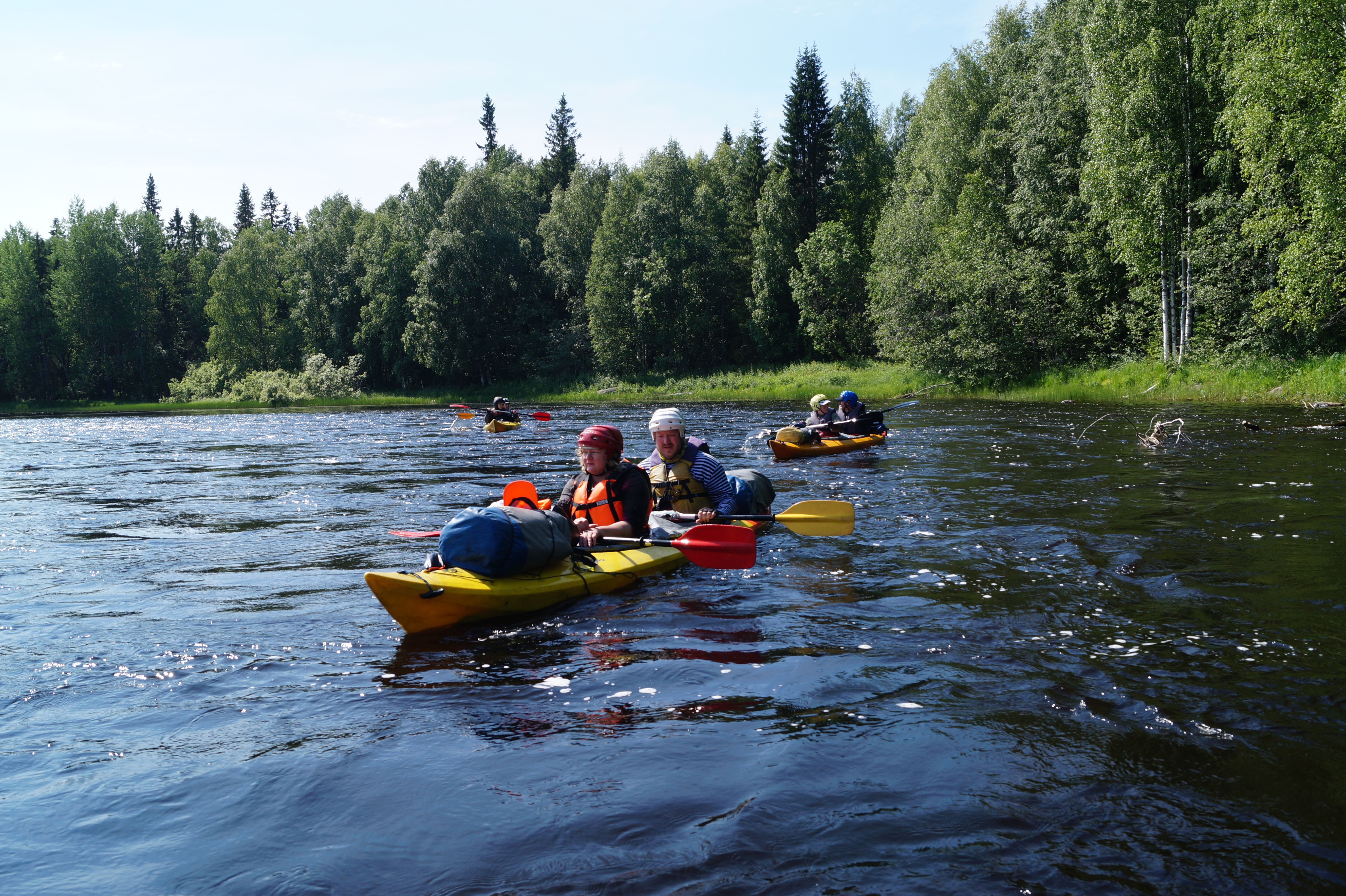 Сплав на байдарках в Карелии по реке Суне